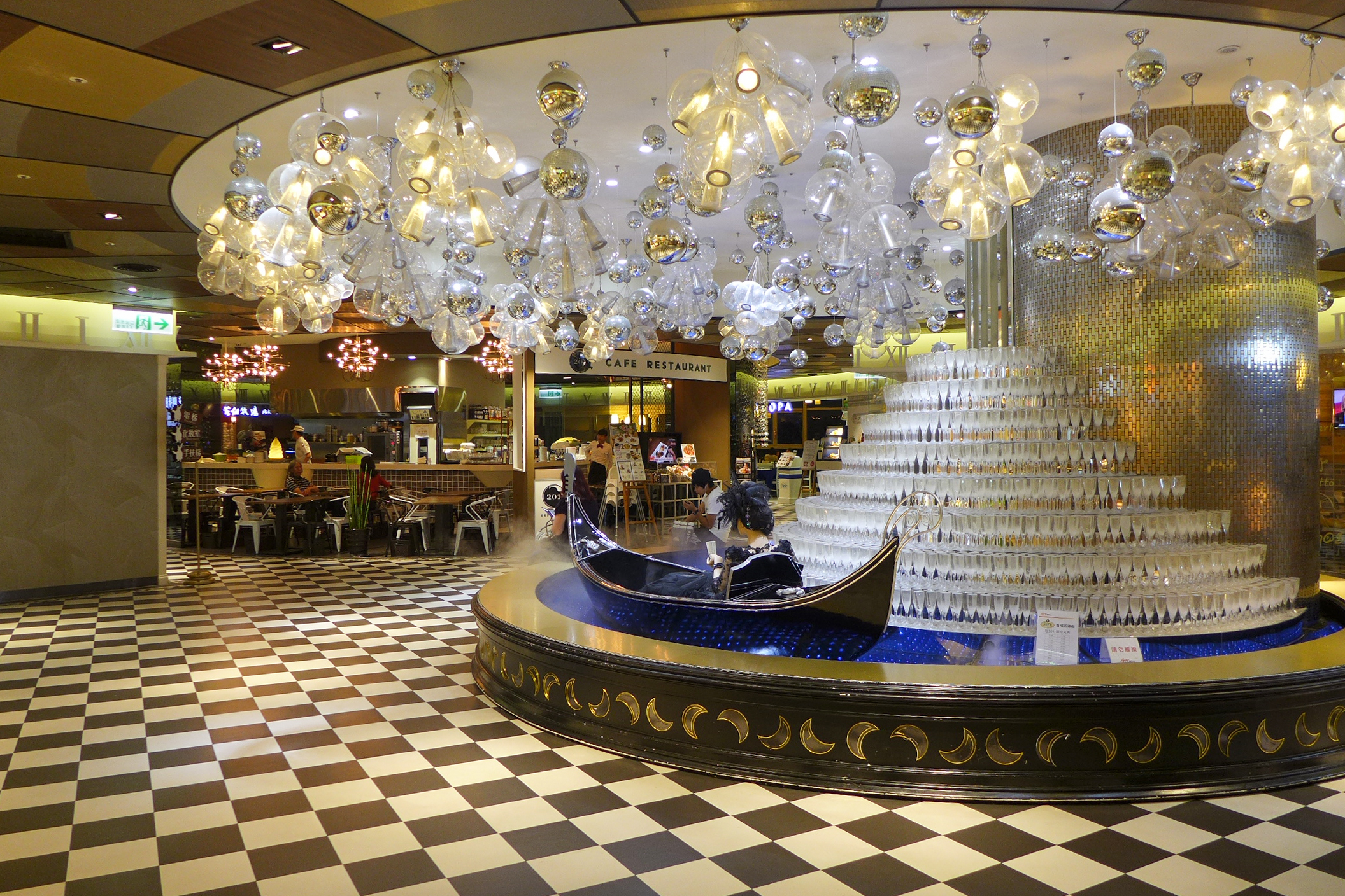 ATT 4 FUN Level 4